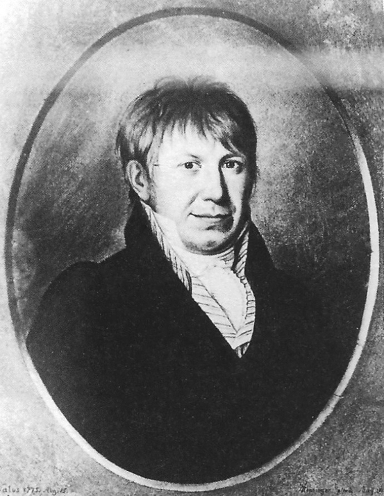 Fanz Dinnendahl [1775-1826), Pioneer der Industrialisierung im Ruhrgebiet, Dampfmaschinenbauer]